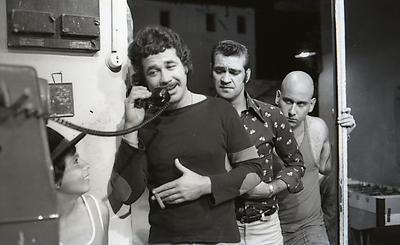 מתוך הסרט צ'רלי וחצי- משה איש כסית, זאב רווח ויהודה ברקן